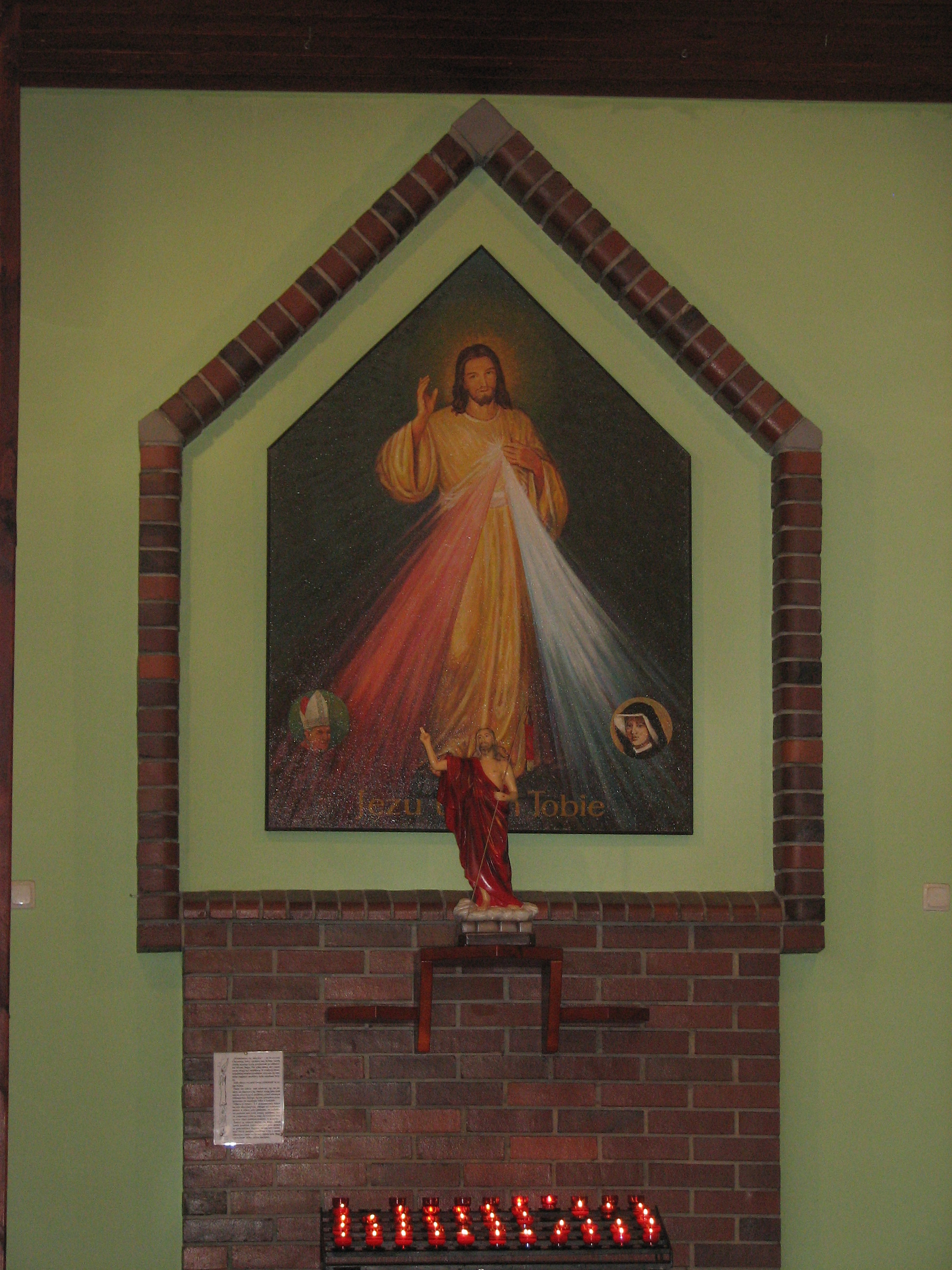 Obraz Miłosierdzia Bożego w parafii św. Rodziny w Tychach